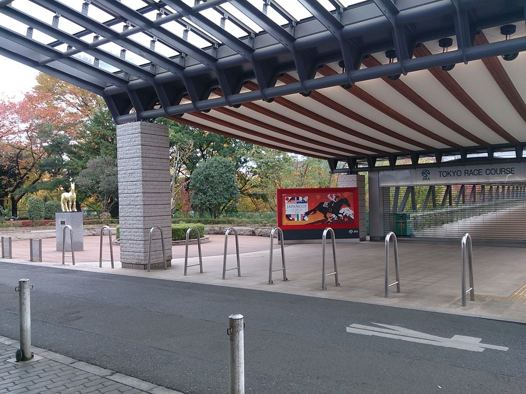 東京競馬場、京王競馬場線府中競馬場前駅入り口。金の像。